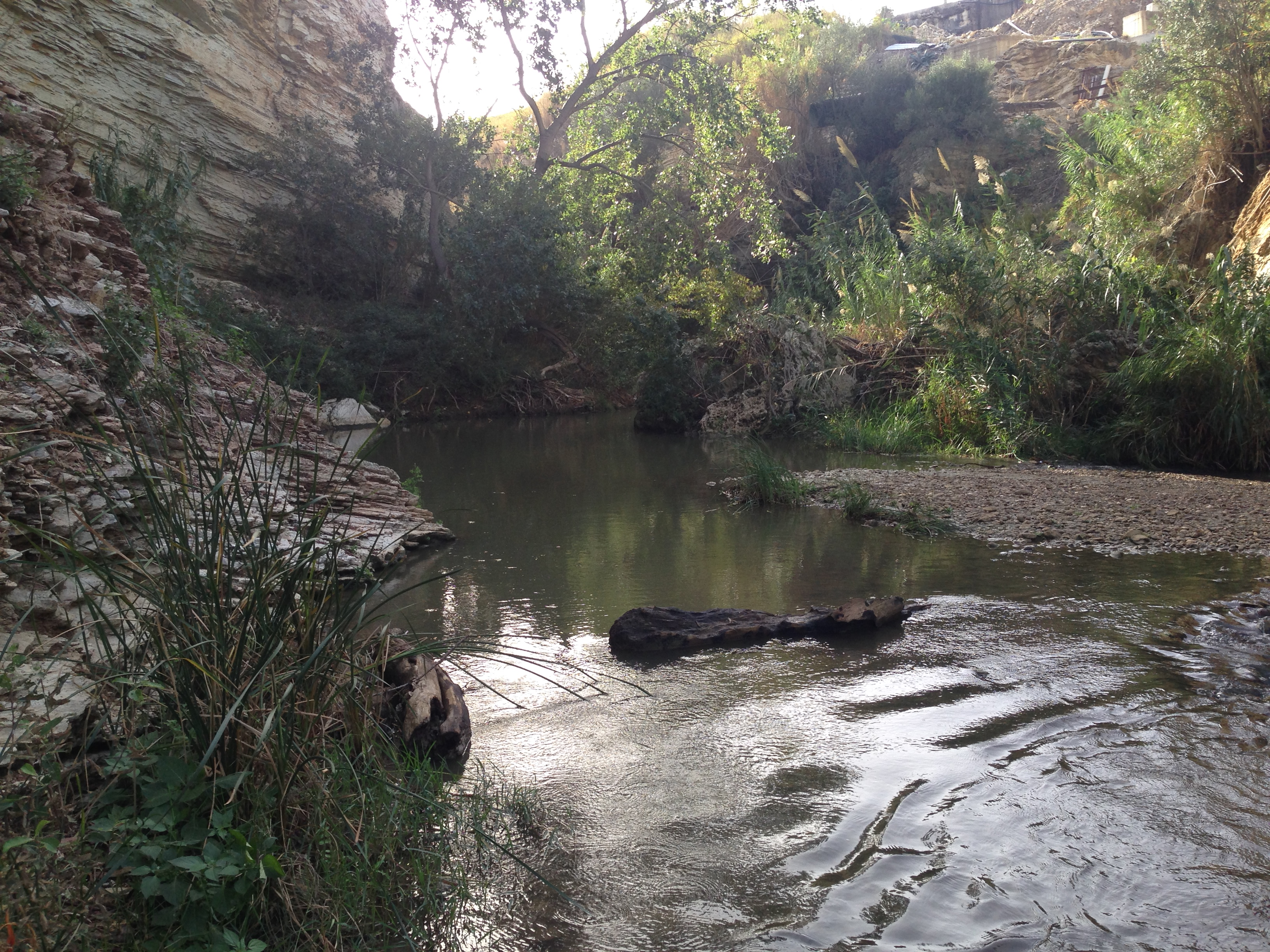 Libere terme segestane